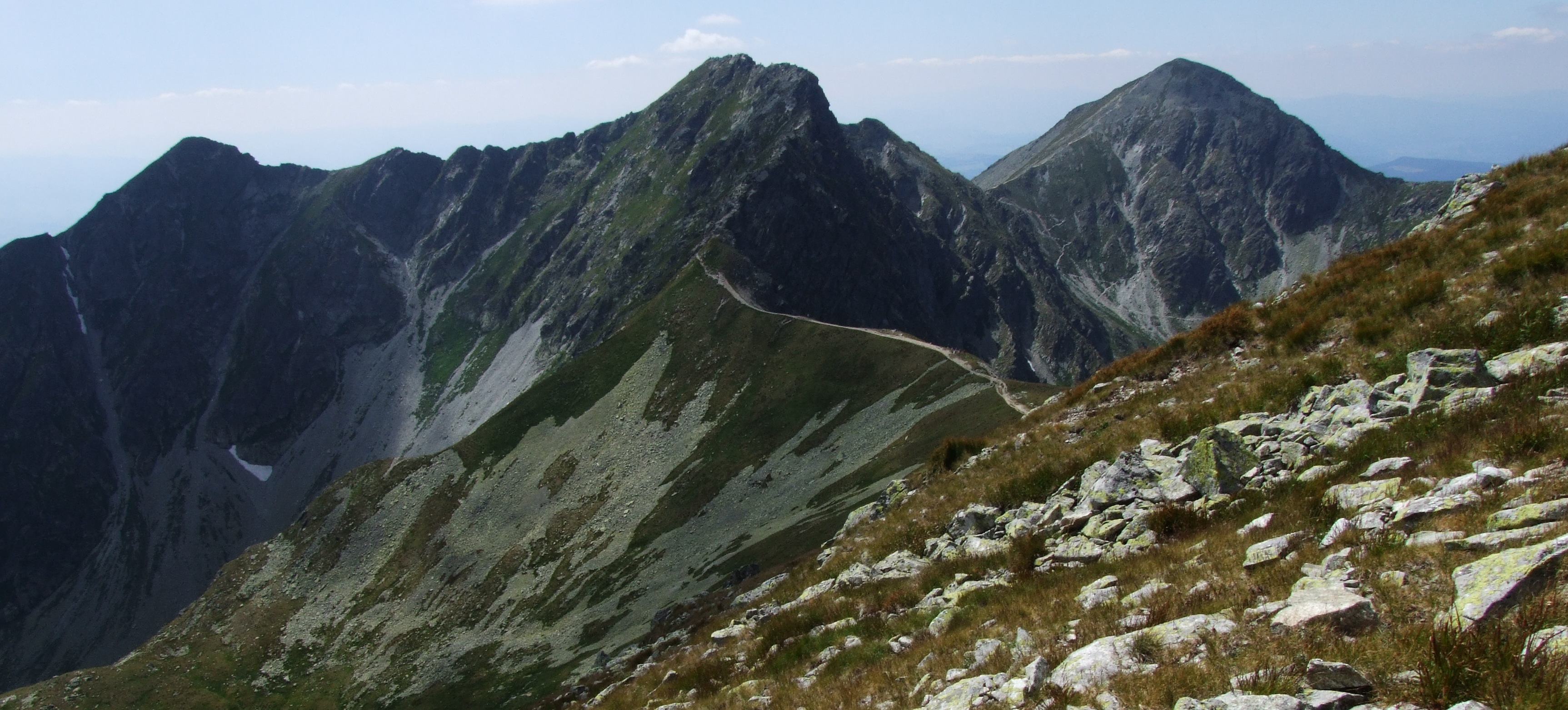 West Tatra Mountains (Jałowiecki Przysłop, Banówka, Pachola)